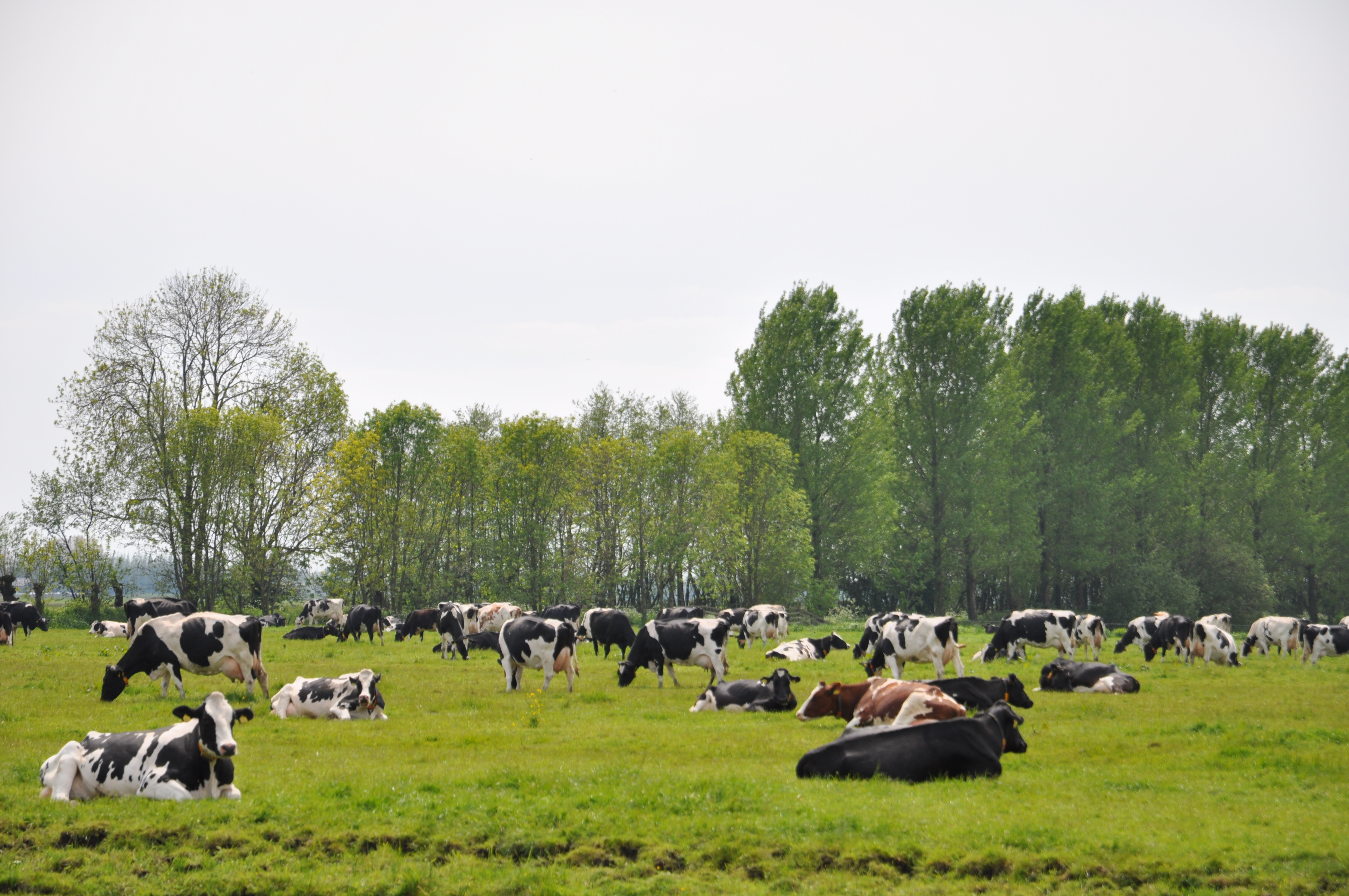 Weidegebied tussen Polsbroekerdam en Oudewater.